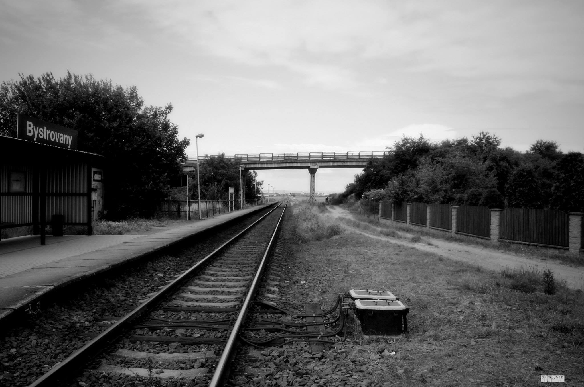 Bystrovany